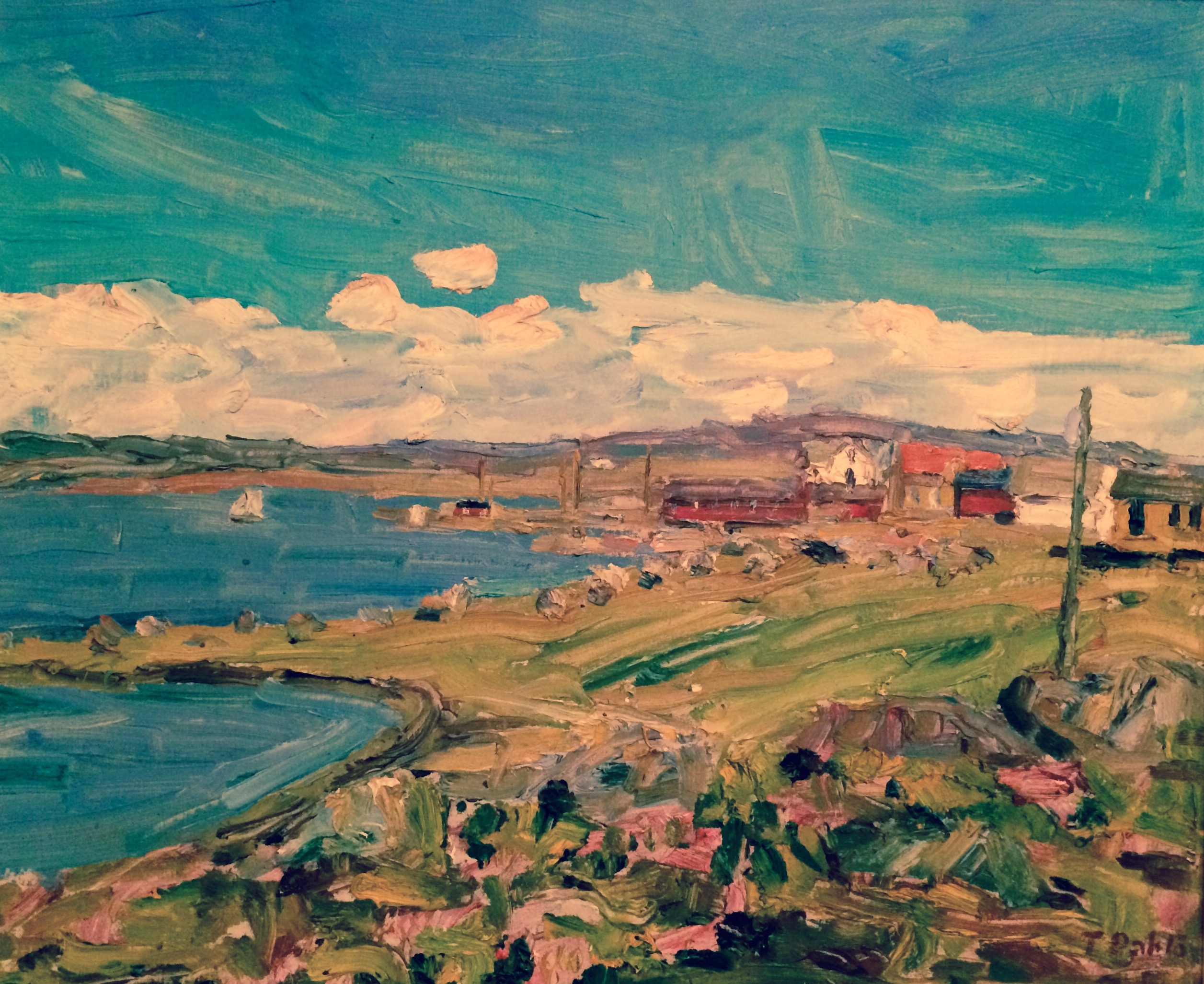 Kustmotiv i olja, troligen Sveriges västkust.